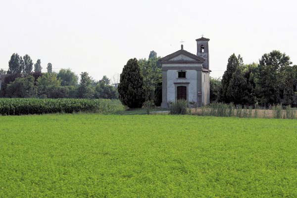 Castel Goffredo, chiesa del Lodolo.